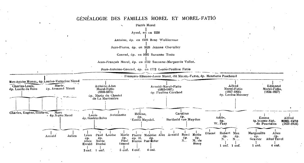 Généalogie des Morel-Fatio Antoine Morel-Fatio famille Le Clerc